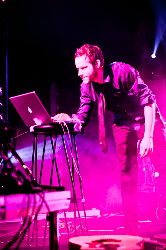 Effi bei der Astronaut Album Release Show im p.p.c. Graz